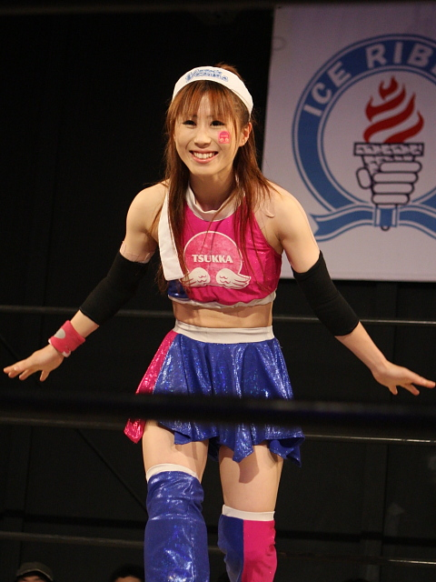 アイスリボン所属プロレスラー 藤本つかさ